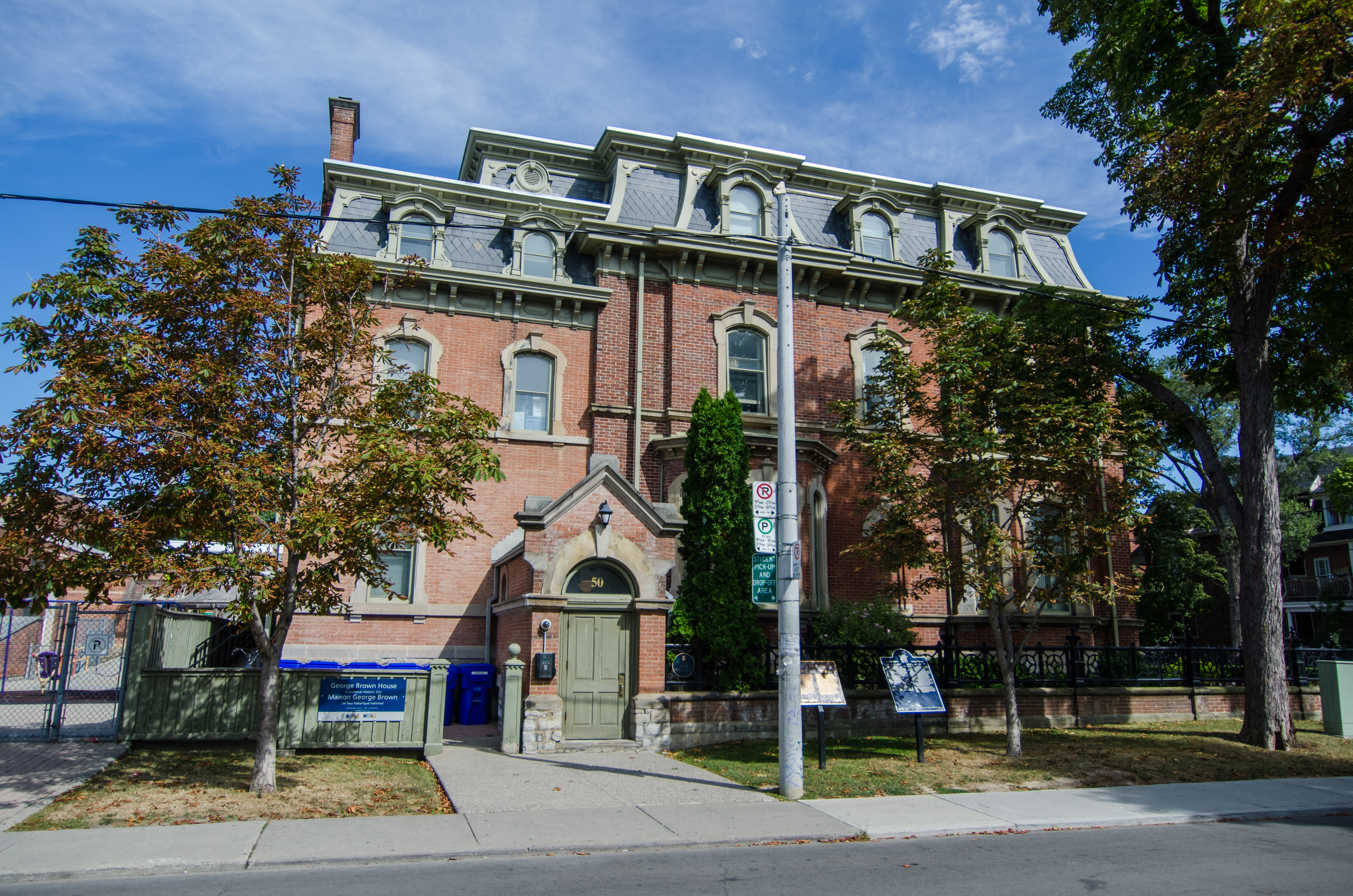 Seen in Shadowhunters episode #205.